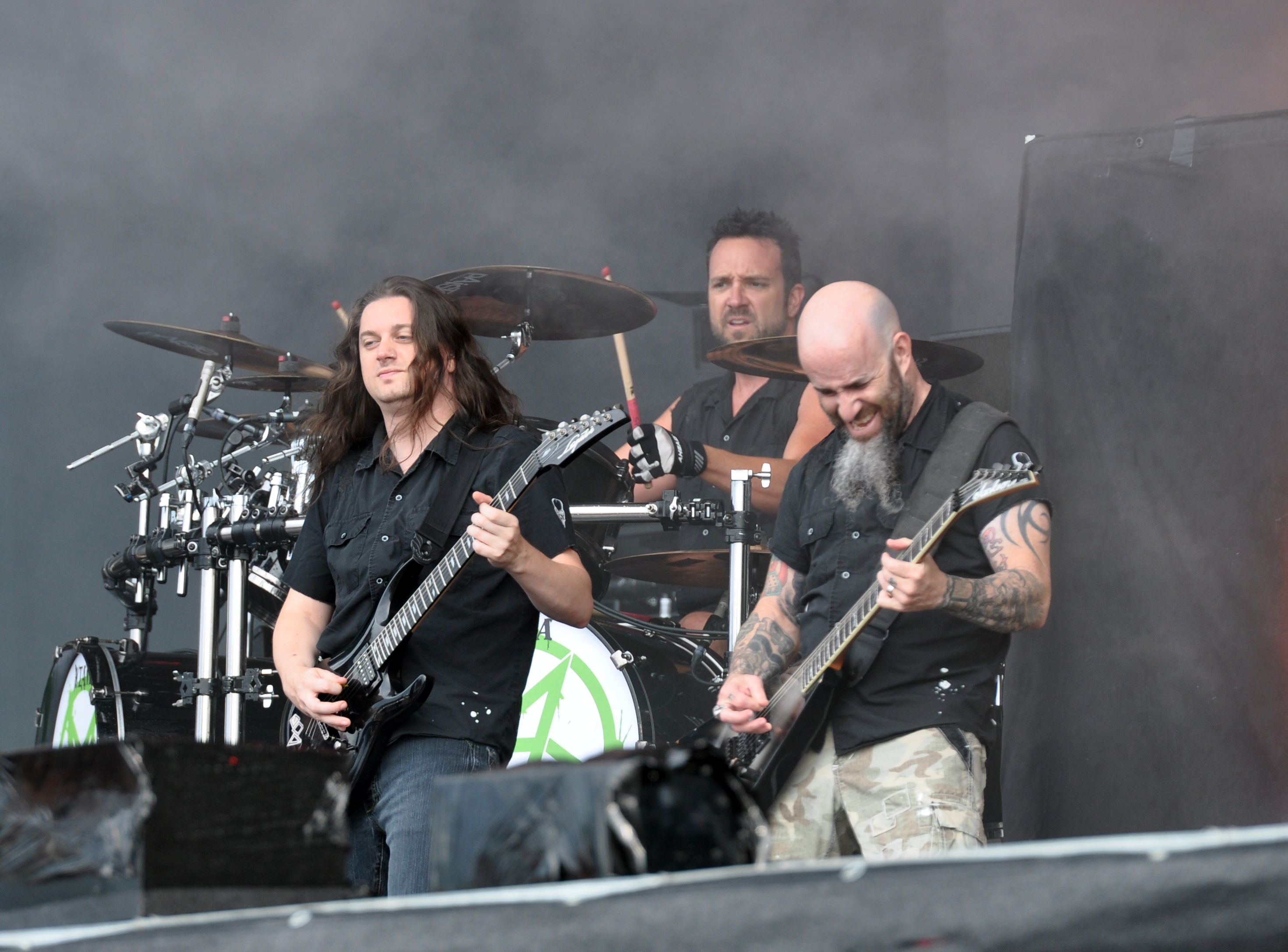 Anthrax at Wacken Open Air 2013